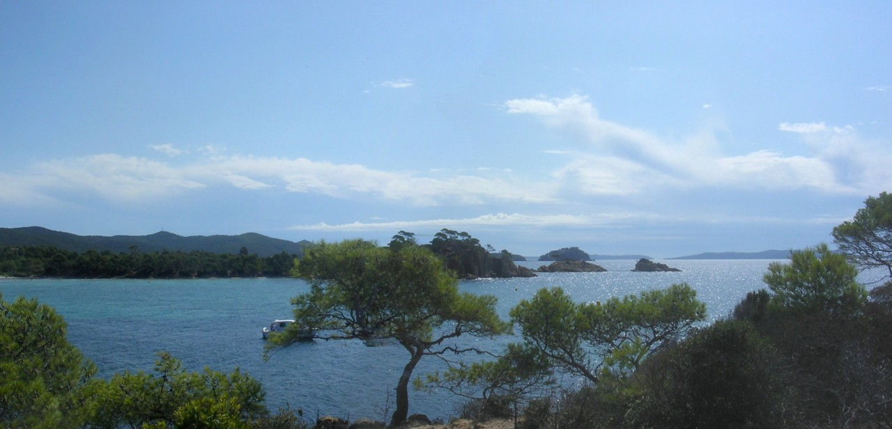 La plage de l'Estagnol (Var) france